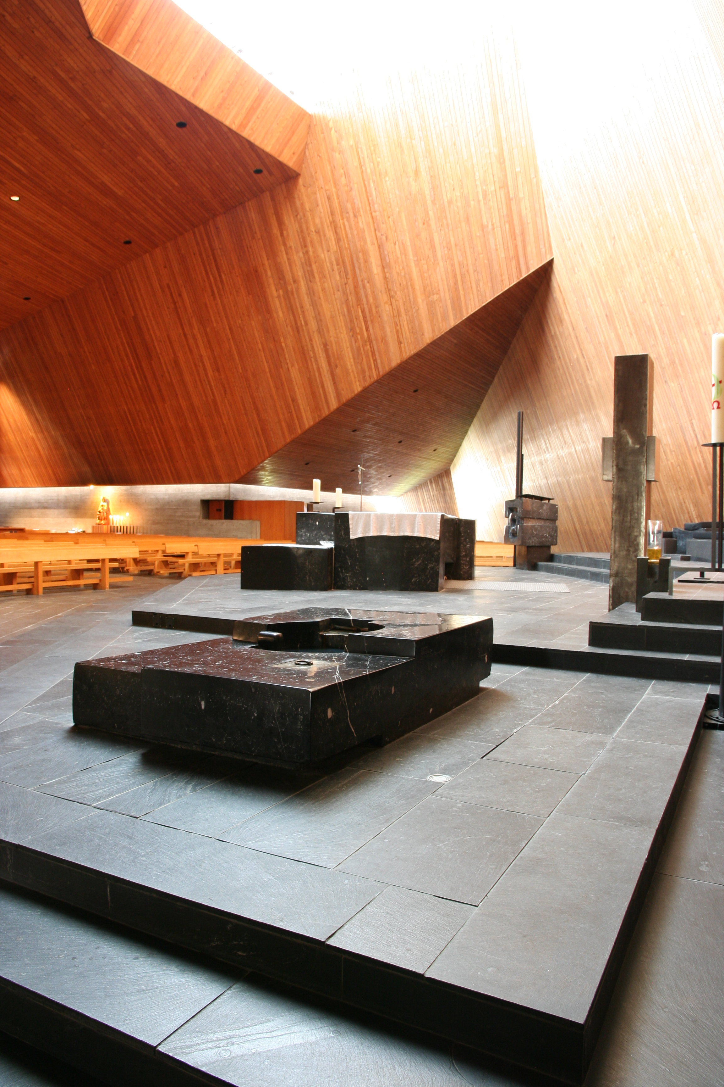 Römisch-katholische Pfarrkirche Maria Krönung Zürich-Witikon, Architektur von Justus Dahinden, Altarraum von Georg Malin